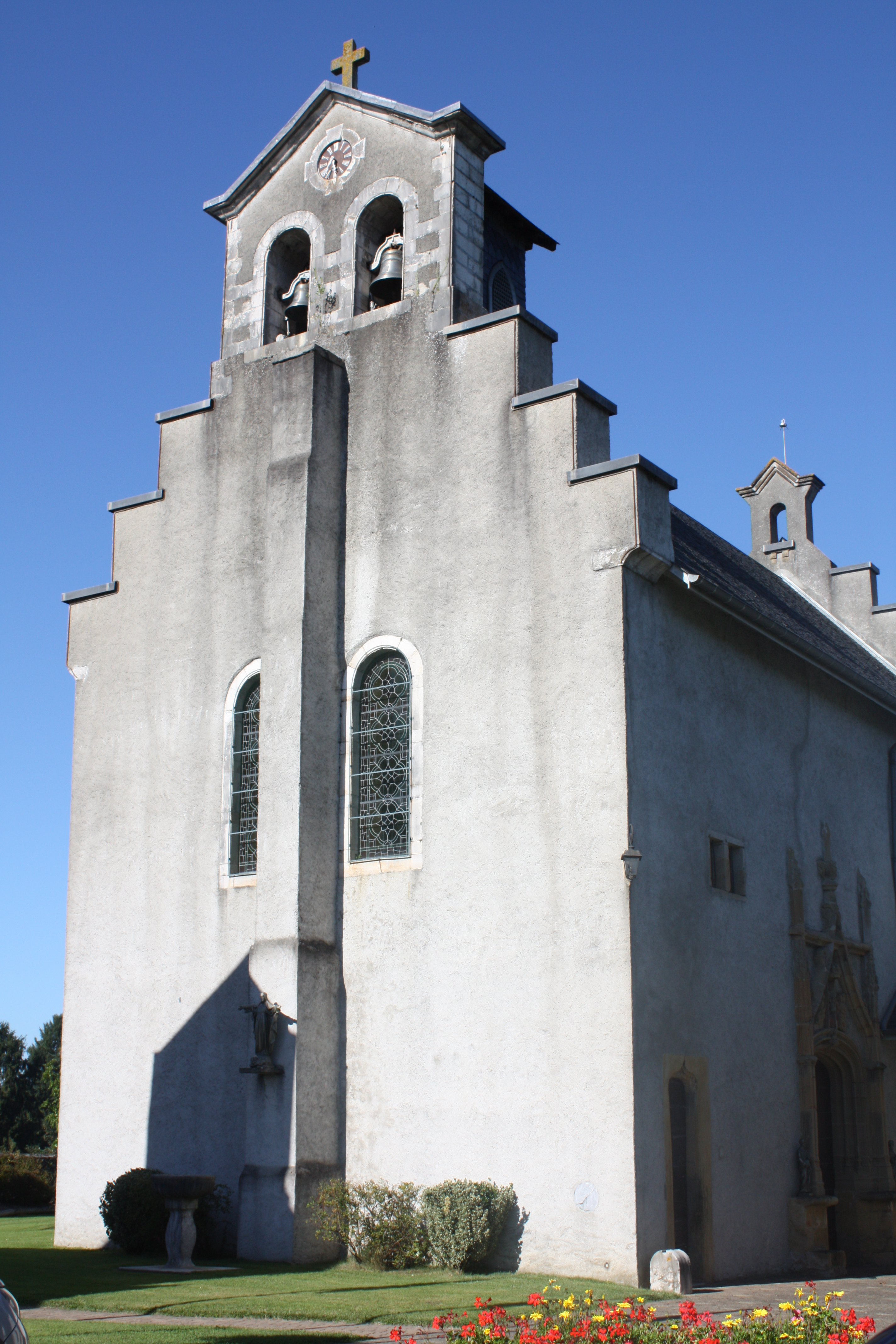 Église Saint-Vincent d'Igonportail, décor extérieur